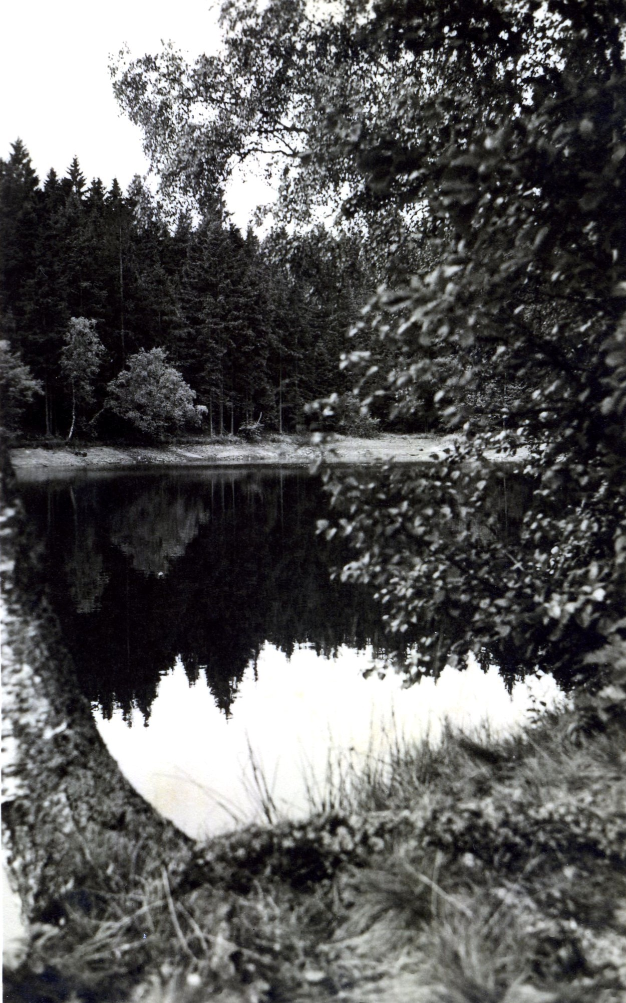 Neuer Teich im August 1940, mit der Orsbezeichnung "Silberteich" versehen